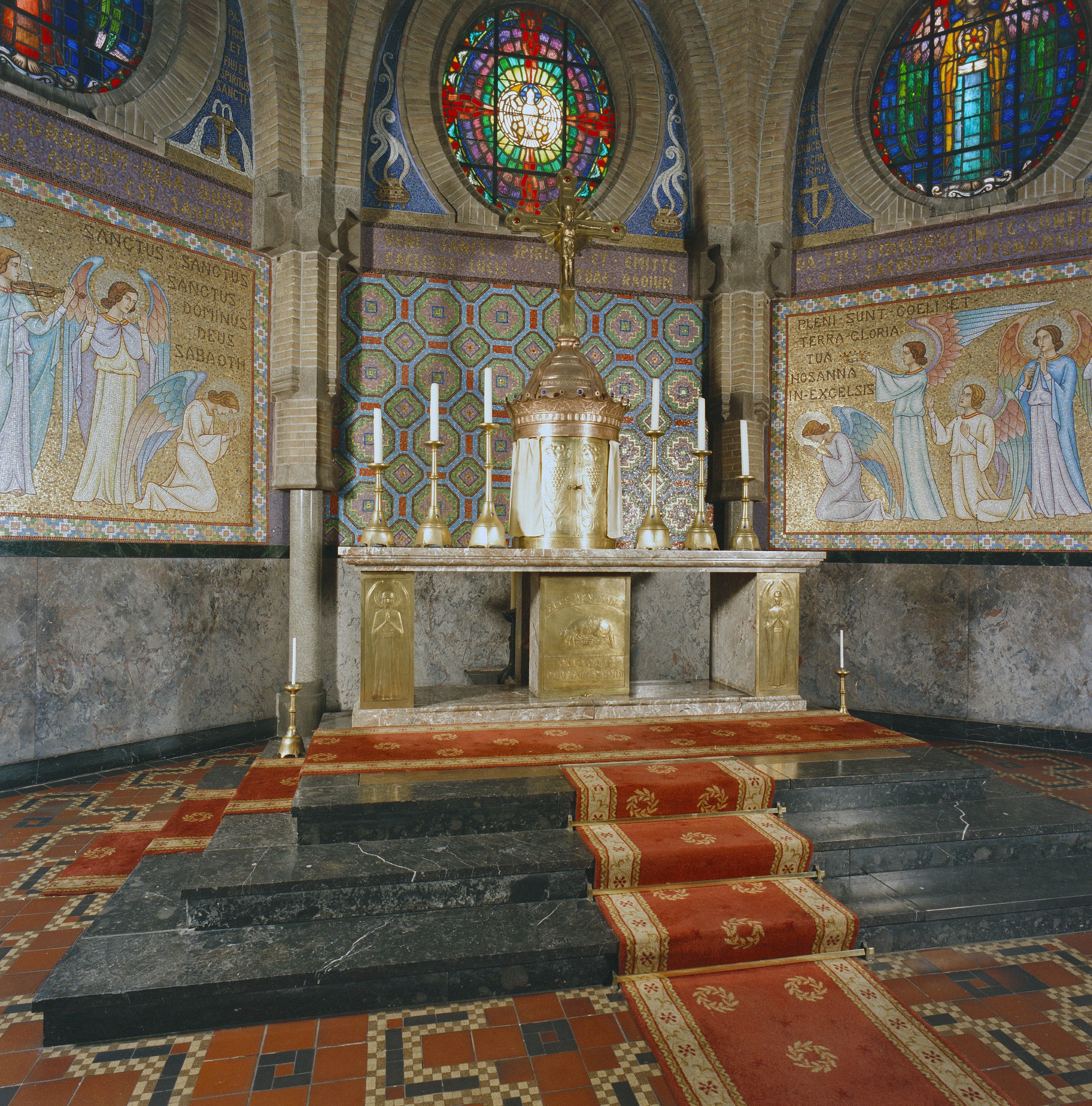 ROOMS-KATHOLIEKE KERK (SINT AGATHAKERK): INTERIEUR, HOOFDALTAAR, MARMER EN KOPER (LAMBERT LOURIJSEN) MET TABERNAKEL, KRUIS EN reliëf (1925)